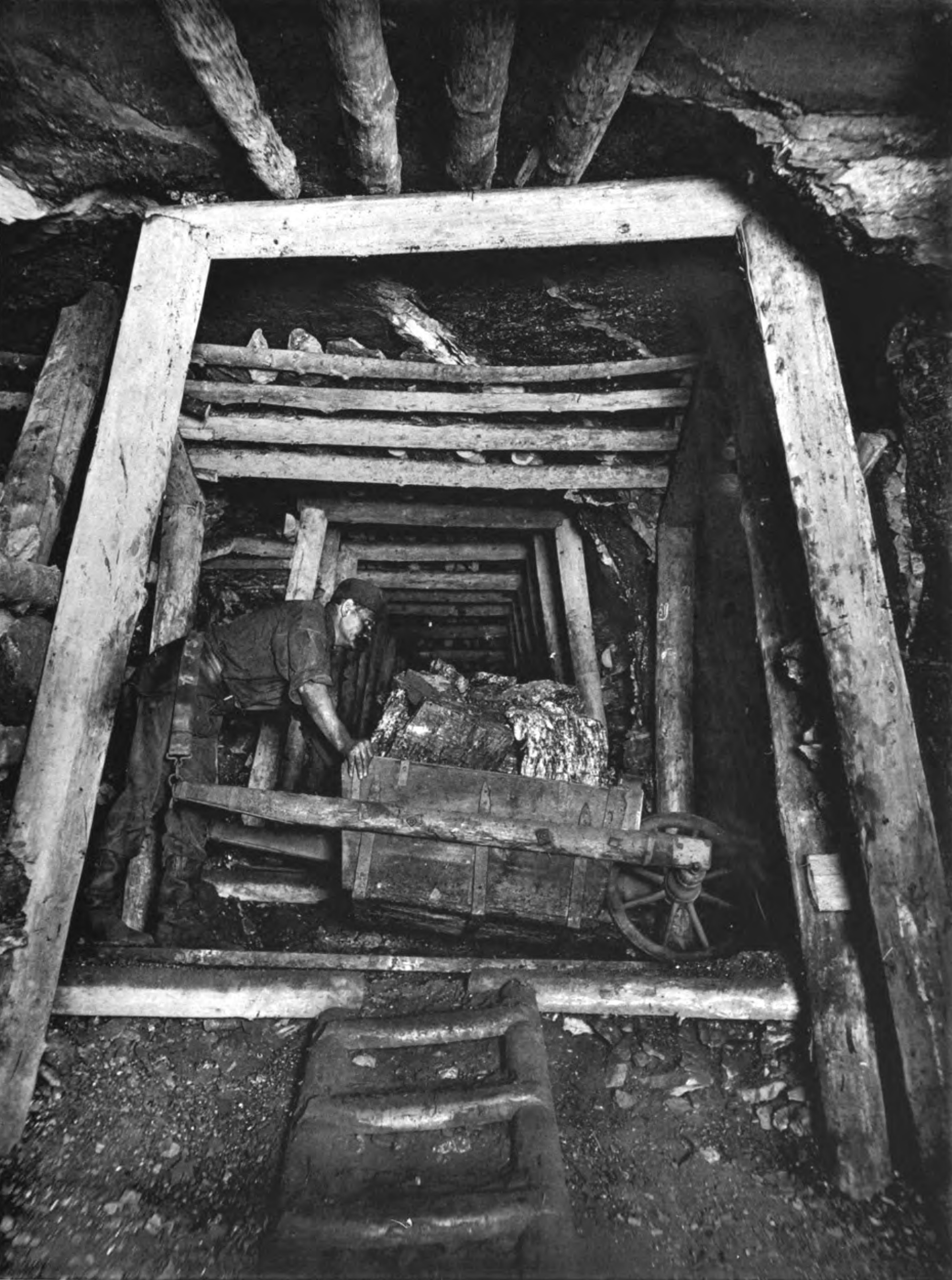 Alte Karrenförderung